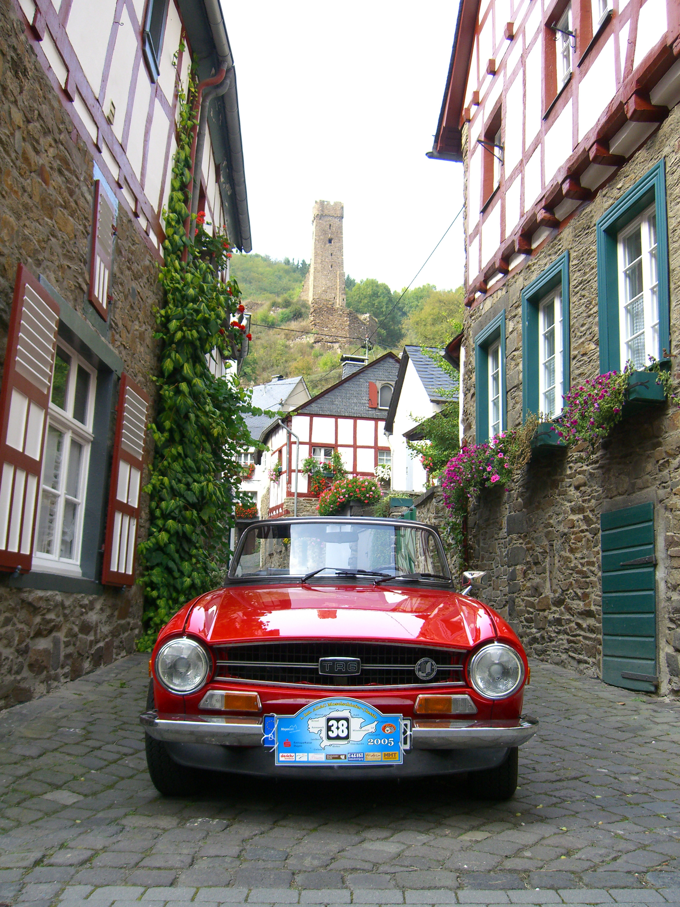 Bild Oldtimer.